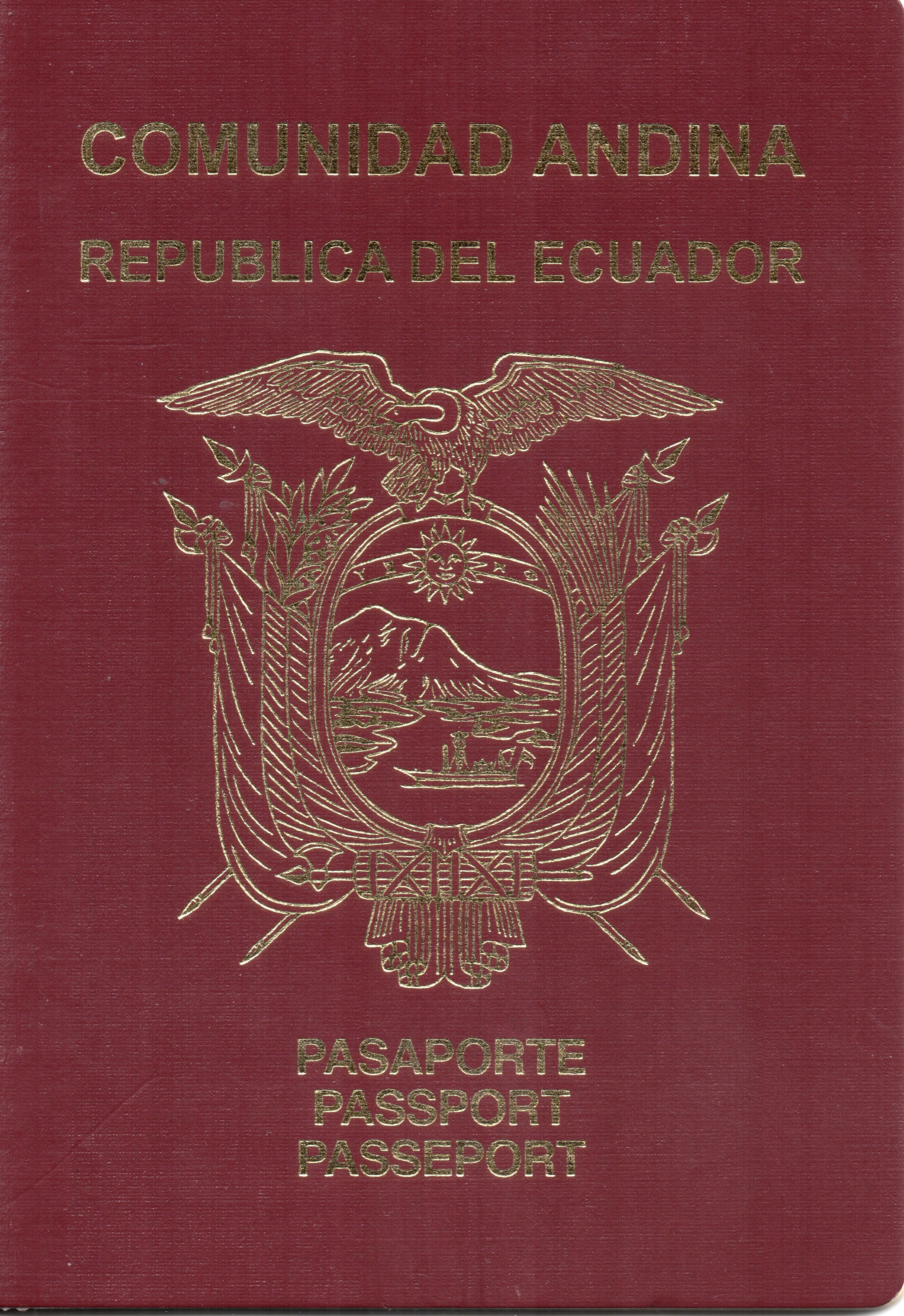 Portada de un pasaporte ecuatoriano actual